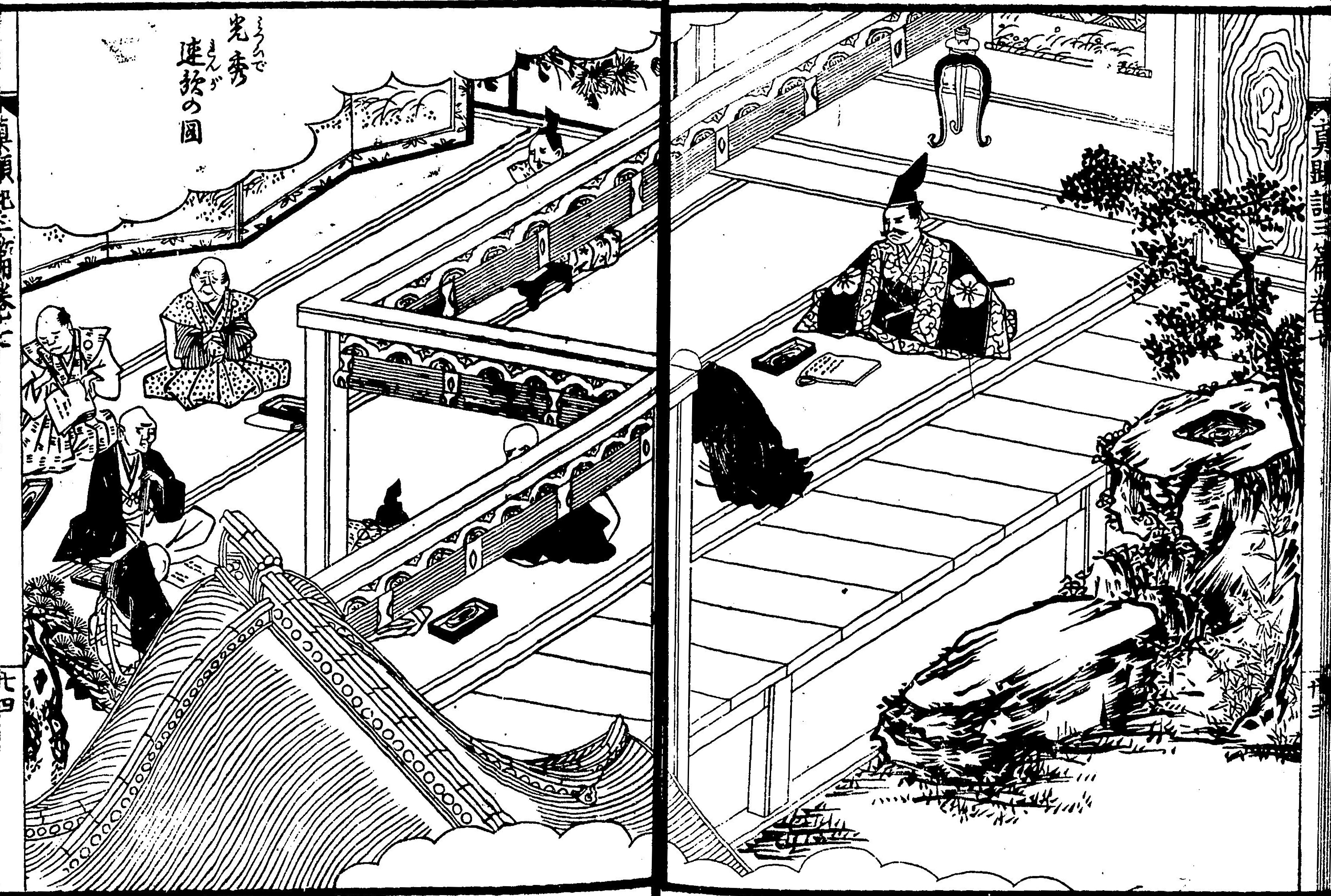 『絵本太閤記』の一場面。（絵：岡田玉山） 「光秀連歌の図」